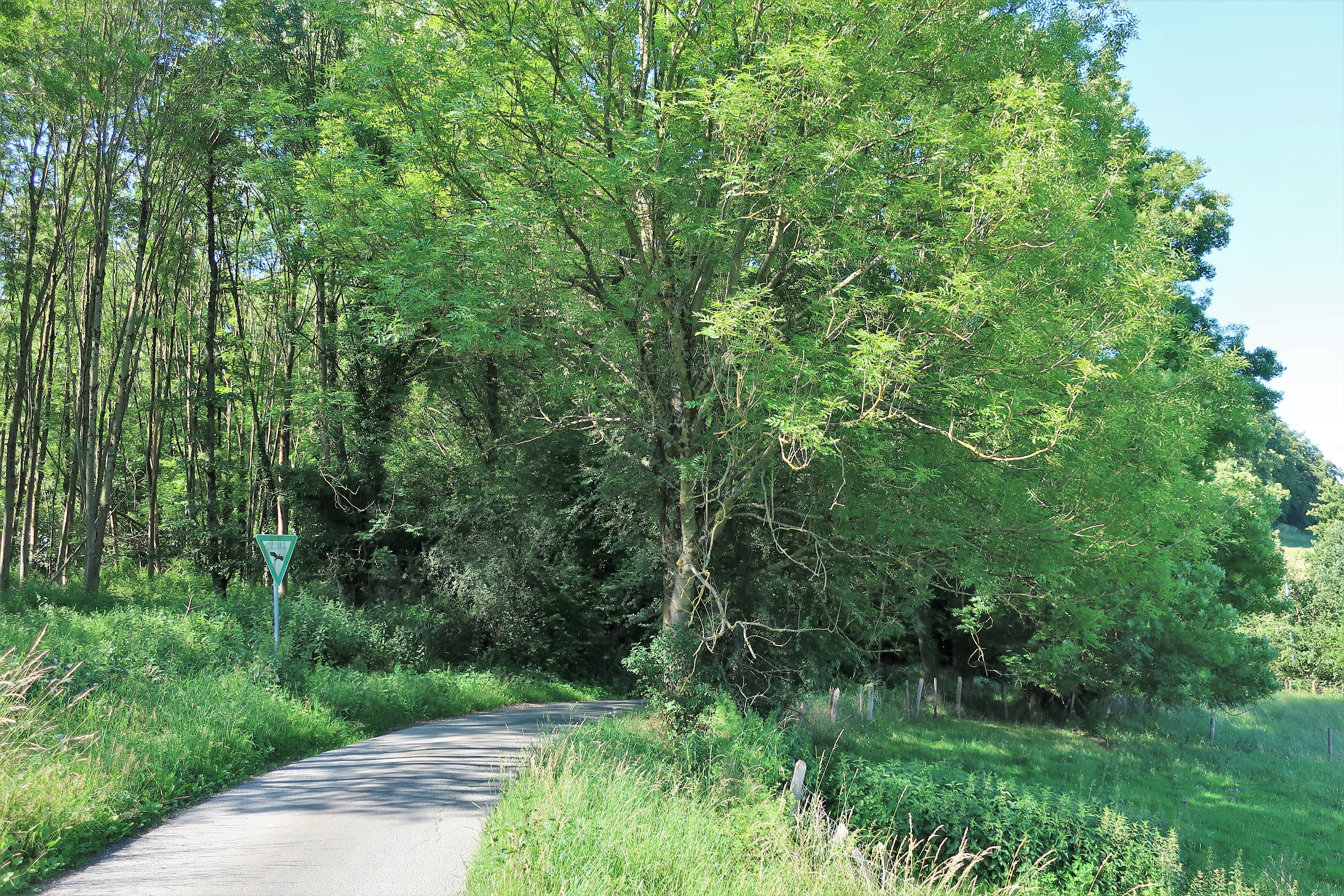 Geschützter Landschaftsbestandteil 1.4.2.63 „Feuchtgebiet Aske“ in Hagen-Westerbauer, beidseitig der Gabelsbergerstraße an der Stadtgrenze zu Gevelsberg. Es handelt sich um einen Bachlauf und vernäßte Wiesenzonen mit einem Teich.